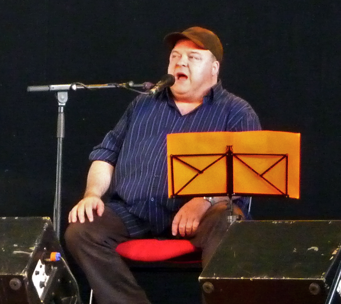 Laurent Jouin avec le groupe Toud'Sames au Printemps de Chateauneuf en avril 2009